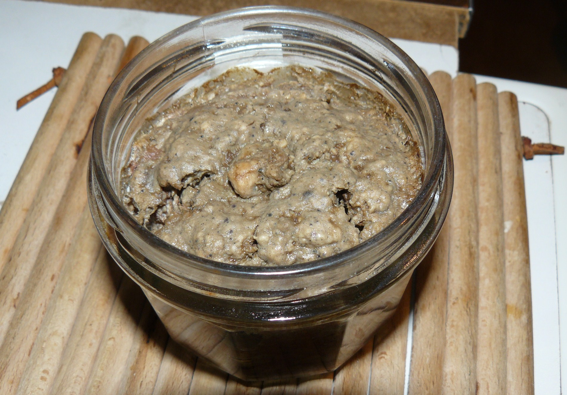 Pork liver mousse. Made in France.